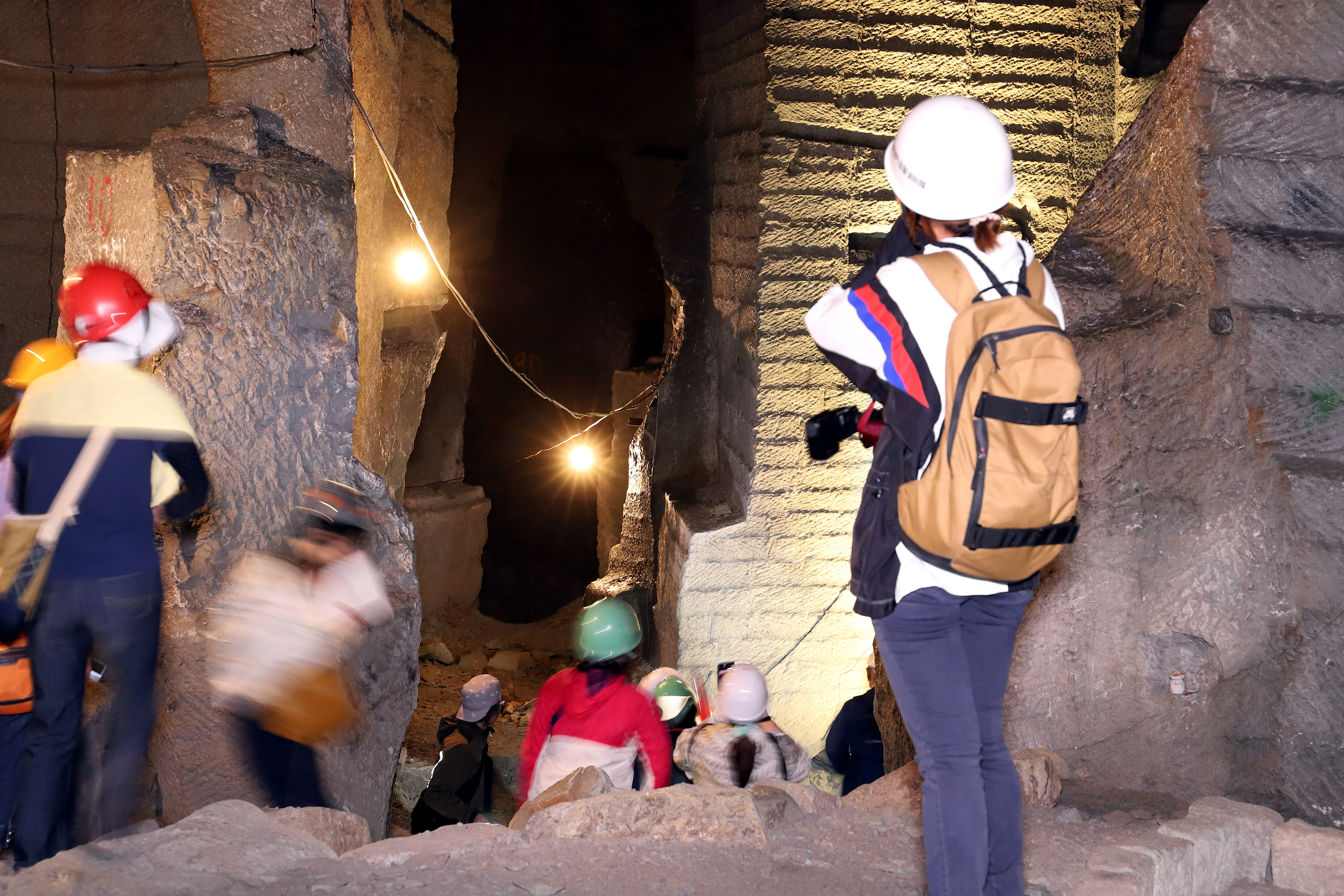 笏谷石採石場跡風景 1963年に閉鎖された七ツ尾口坑道跡より入坑